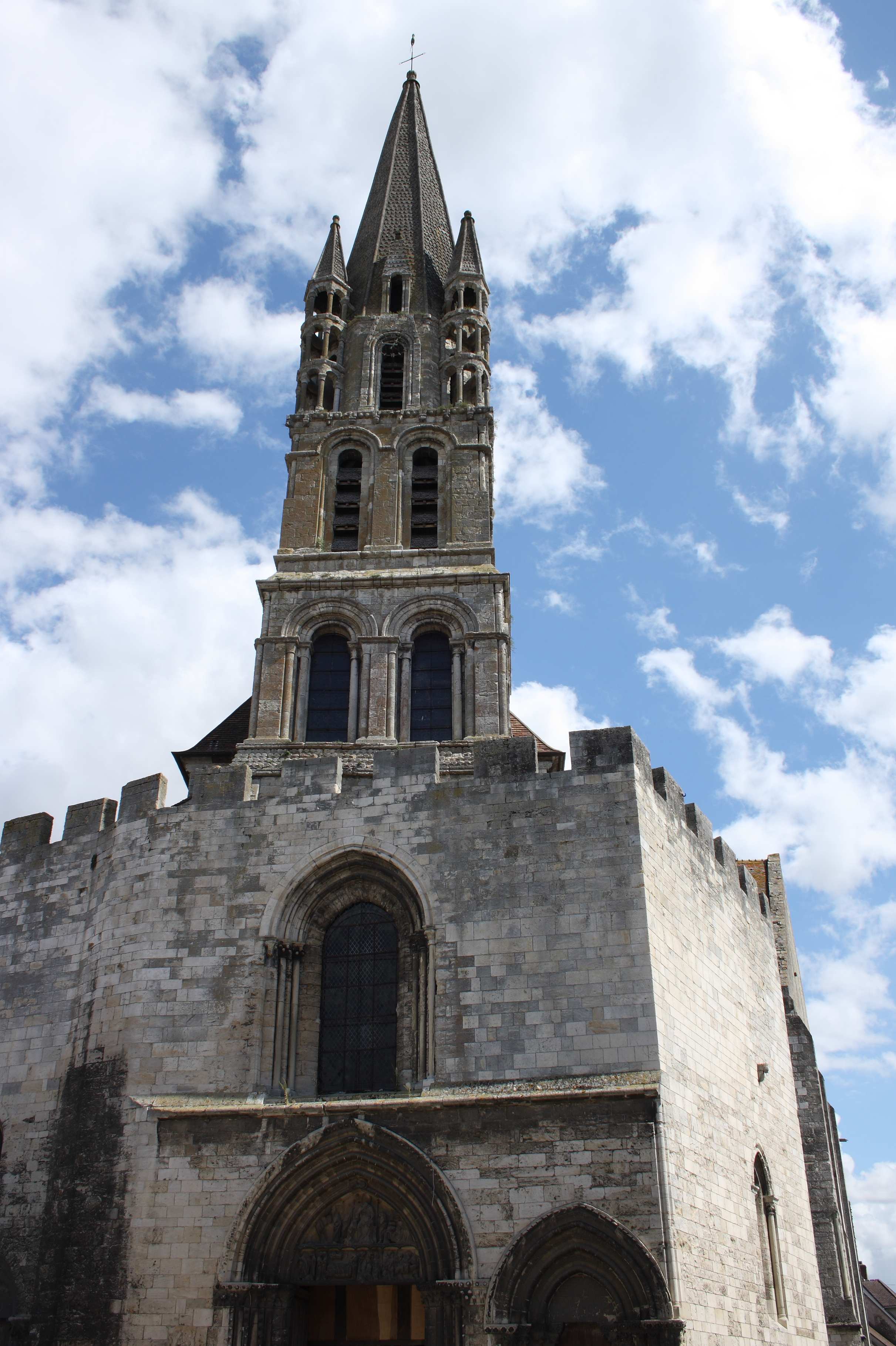 Katholische Pfarrkirche Notre-Dame-du-Fort in Étampes im Département Essonne in der Region Île-de-France (Frankreich), Westfassade mit Vorhalle und Glockenturm Object location48° 26′ 05.89″ N, 2° 09′ 51.01″ E